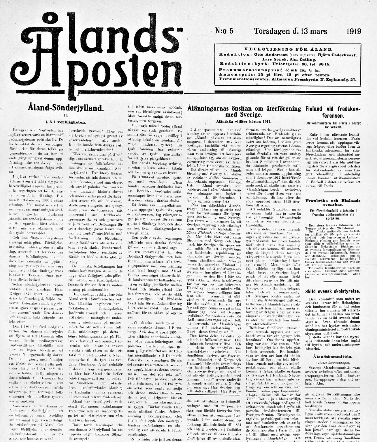 Ålands Posten Första sidan